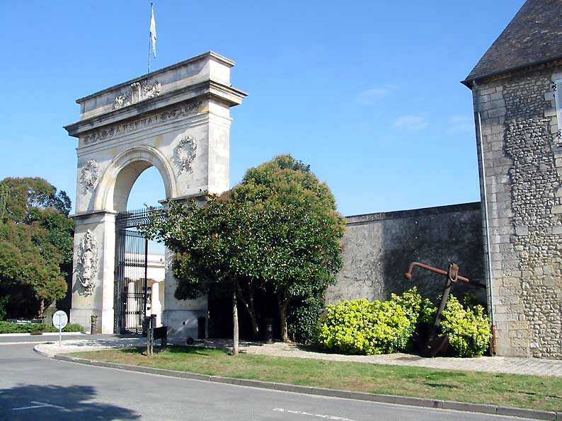 Rochefort. La porte du soleil, principal accès à l'ancien arsenal maritime de Rochefort. Porte de l'Arsenal (aussi appelée porte du Soleil).